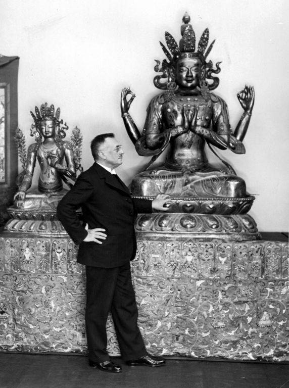 Sven Hedin på Liljevalchs i Stockholm 1932. Han står framför två buddhor från de samlingar han förvärvade i Kina under sin sista expedition. Samlingarna utgör en del av Etnografiska museets samlingar. Utställningen var Från tält och tempel i fjärran östern This is a photo of an artwork at the Museum of Ethnography in Sweden with the identifier: 1935.50.1712 This is a photo of an artwork at the Museum of Ethnography in Sweden with the identifier: 1935.50.1709